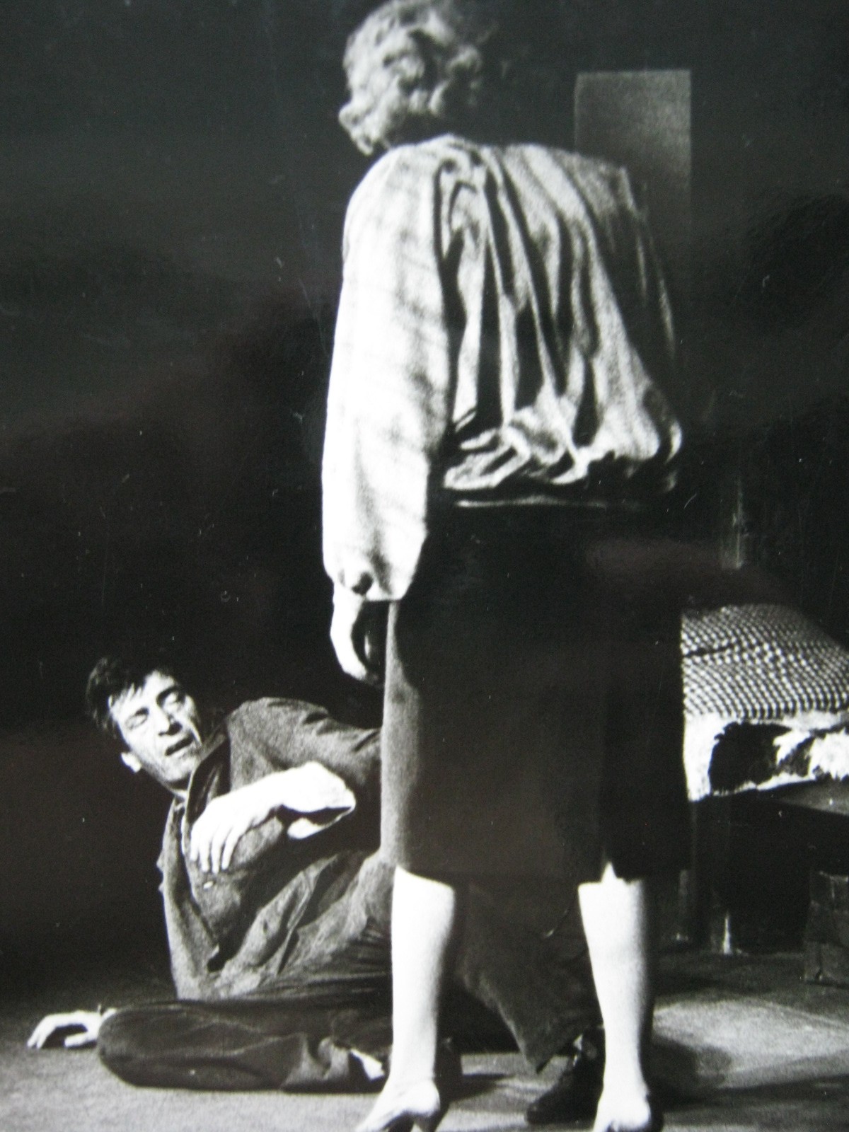 Сцена из спектакля «Порог» Ленинградского академического Большого драматического театра имени М. Горького. В роли Андрея Буслая Валерий Ивченко, в роли Алины Тамара Лебедева, режиссёр-постановщик спектакля Егоров Геннадий Семёнович